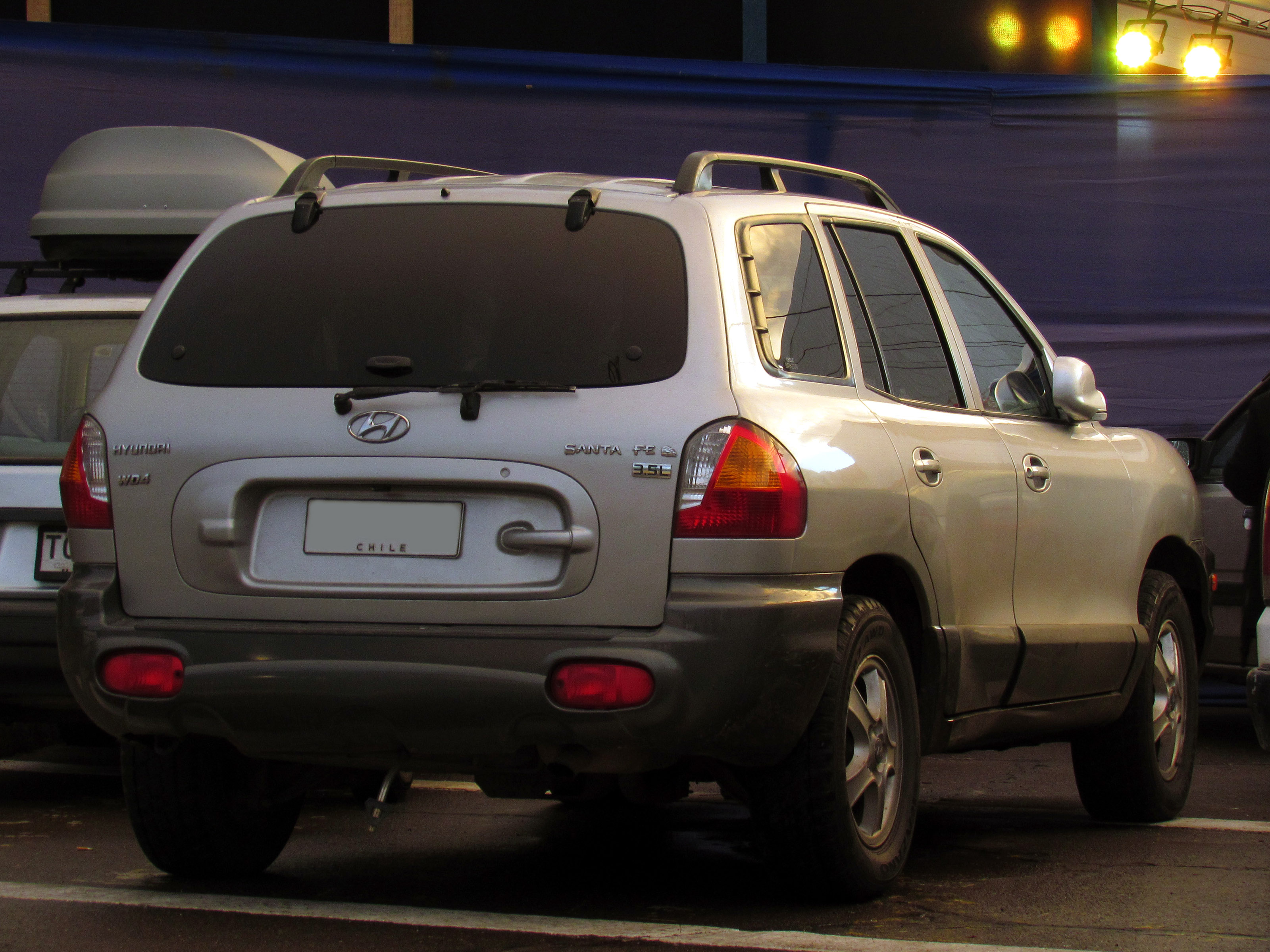 Hyundai Santa Fe 3.5L 4WD 2003